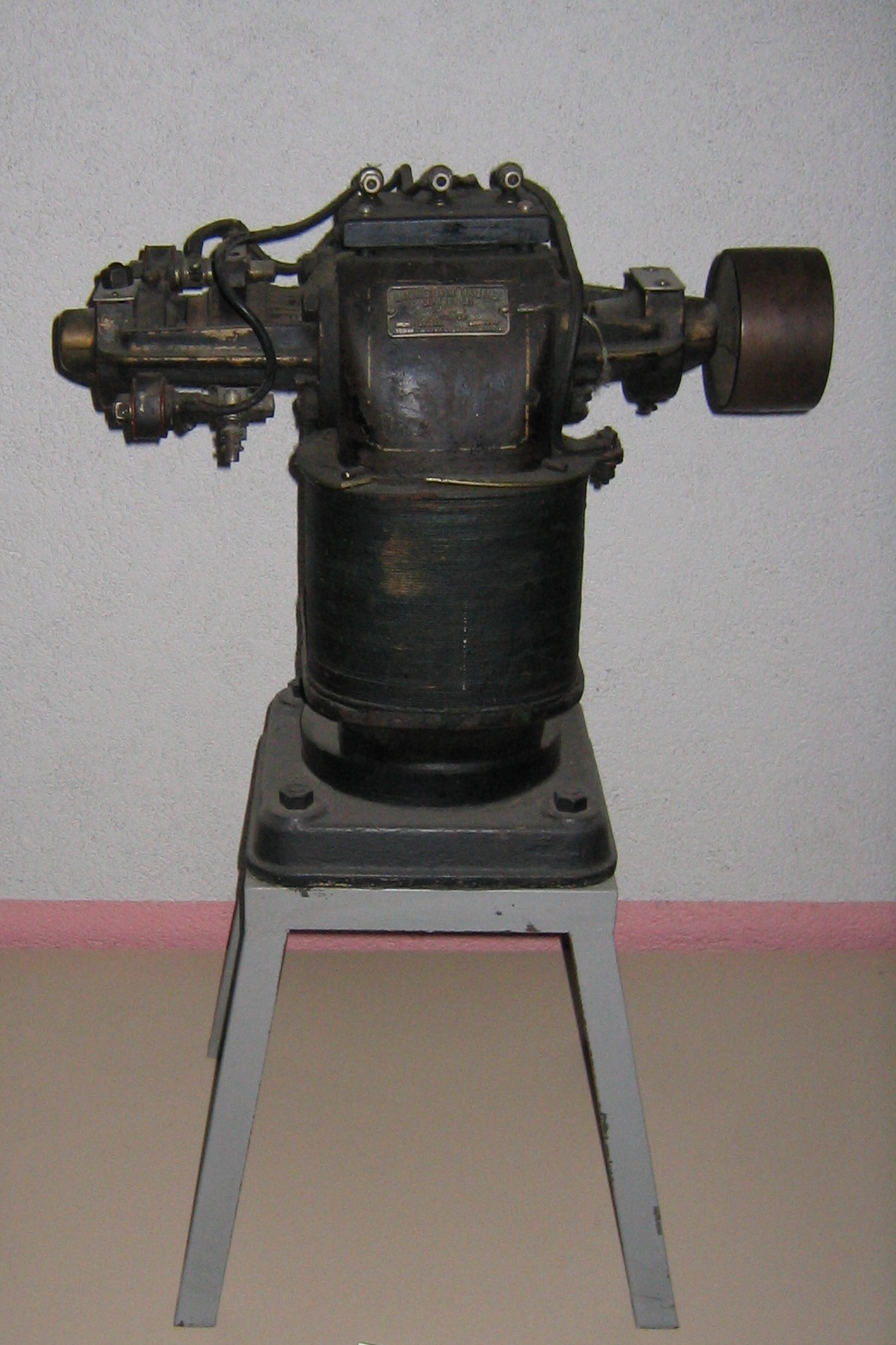 Historischer Gleichstrommotor. aufgenommen während einer Brauerei-Besichtigung bei Fürstenberg in Donaueschingen